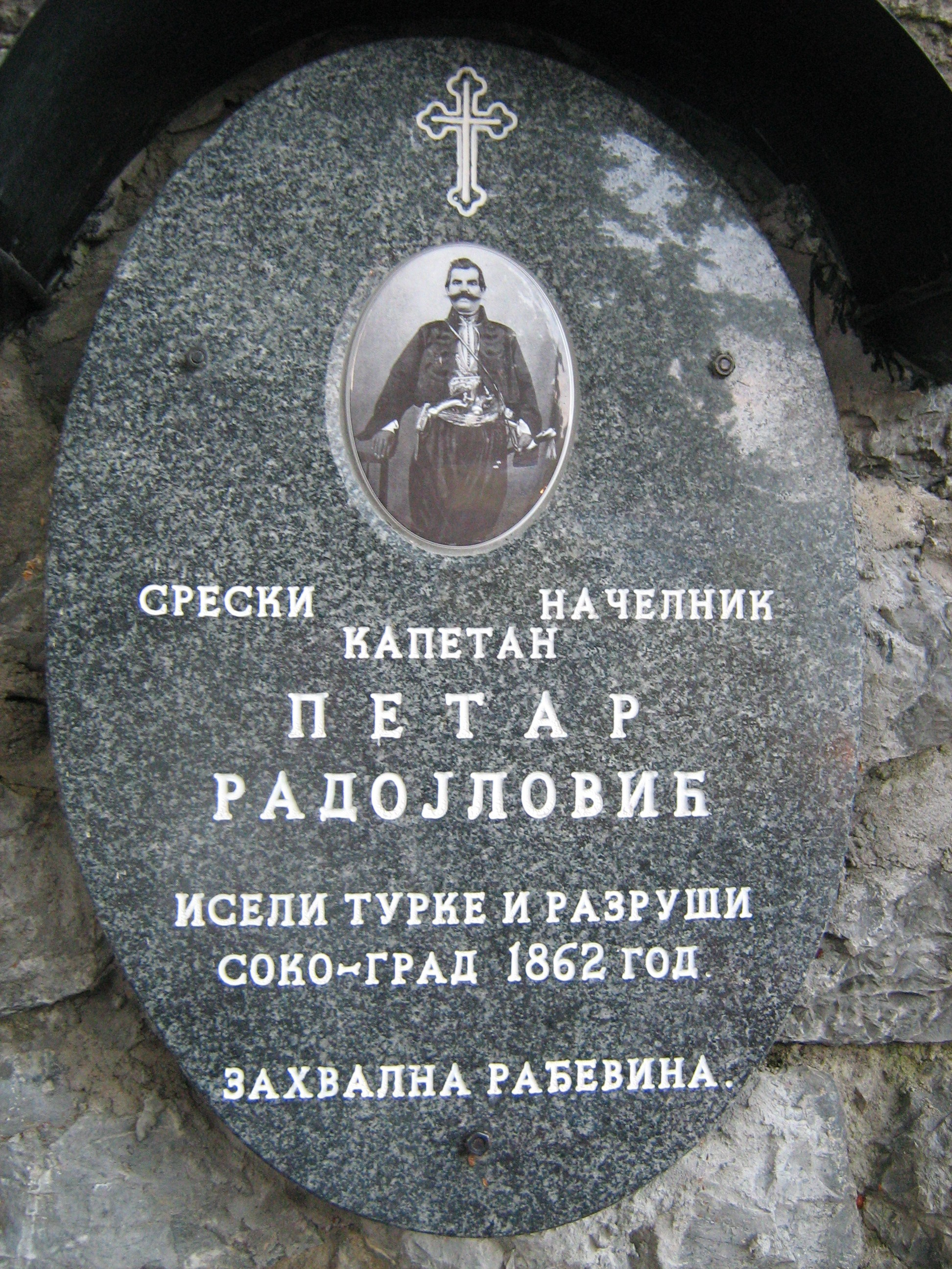 Спомен плоча Петру Радојловићу